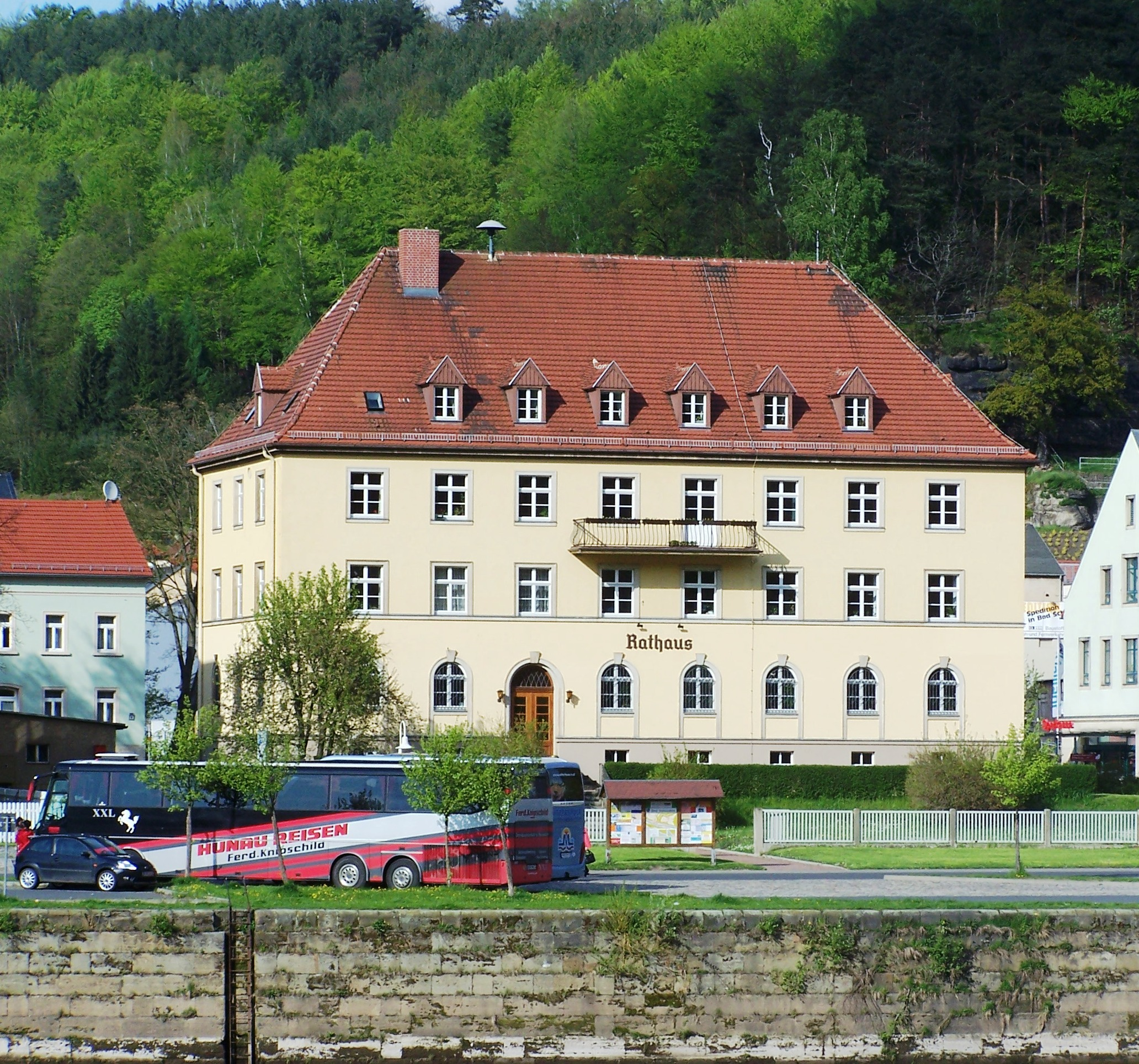 Rathaus in Bad Schandau, Sächsische Schweiz